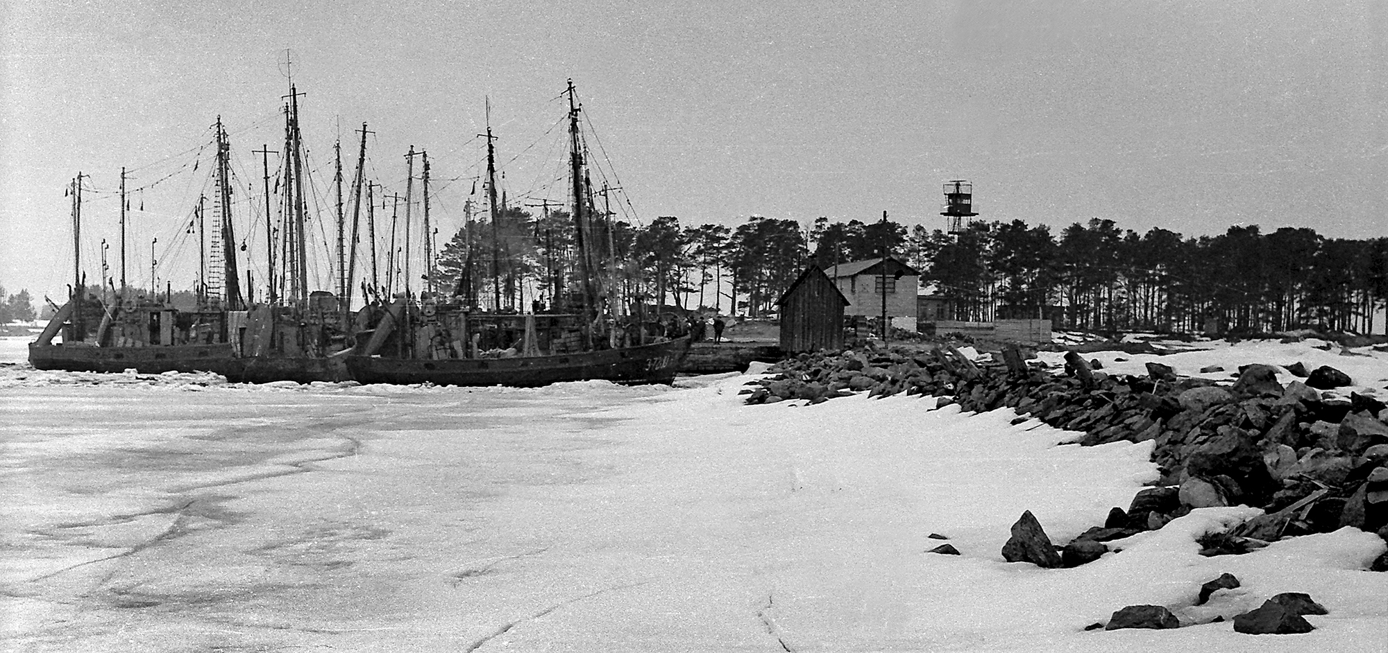 Vergi sadam, märts 1971